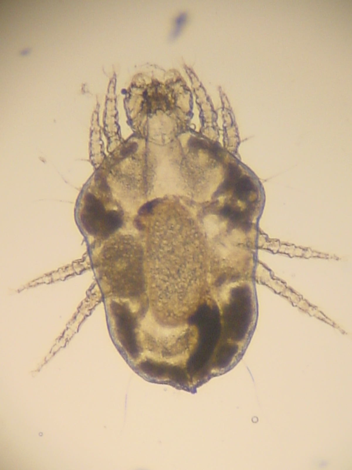 Raubmilbe, Cheyletiella